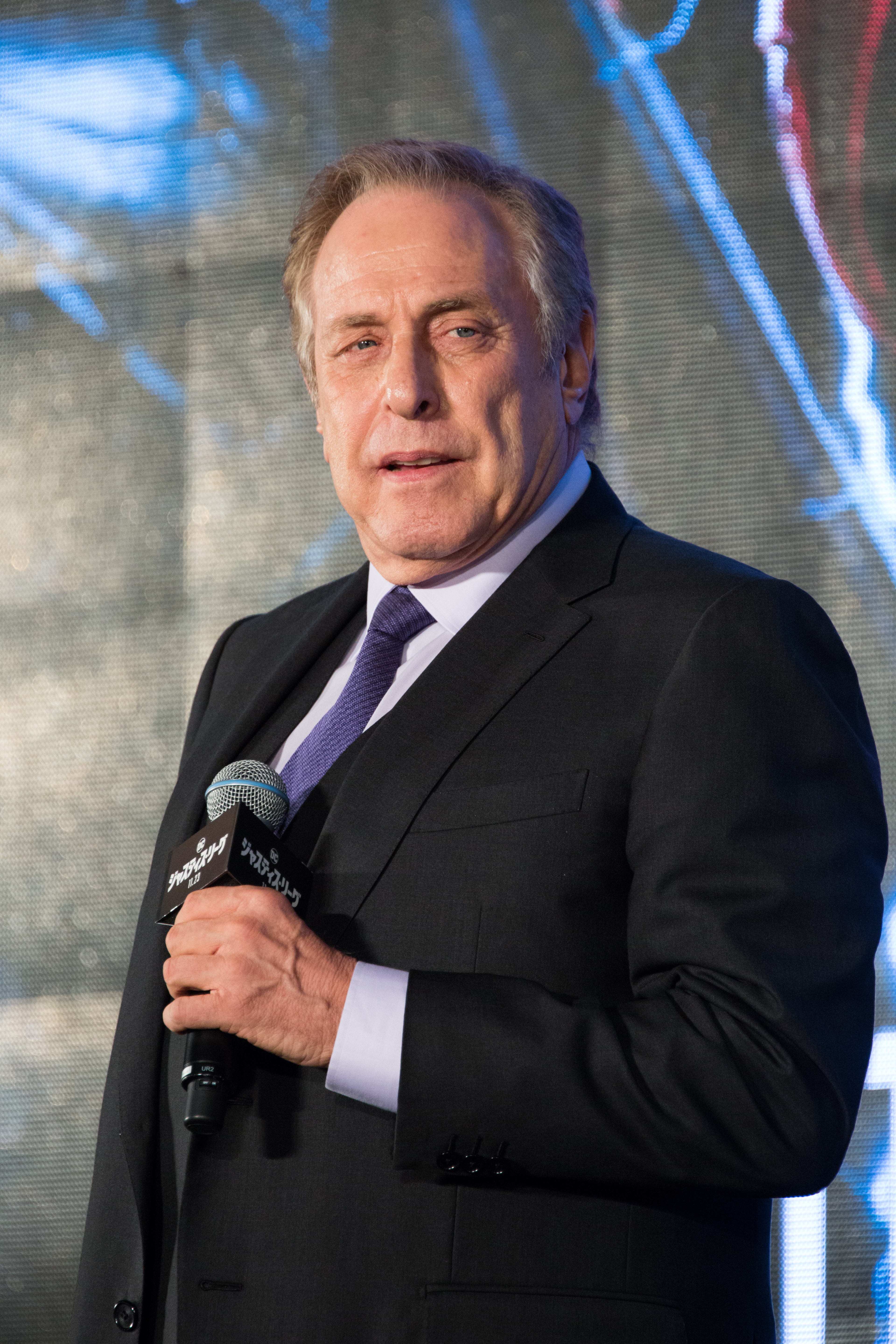 ジャスティス・リーグ ジャパン・プレミア レッドカーペット チャールズ・ローヴェン